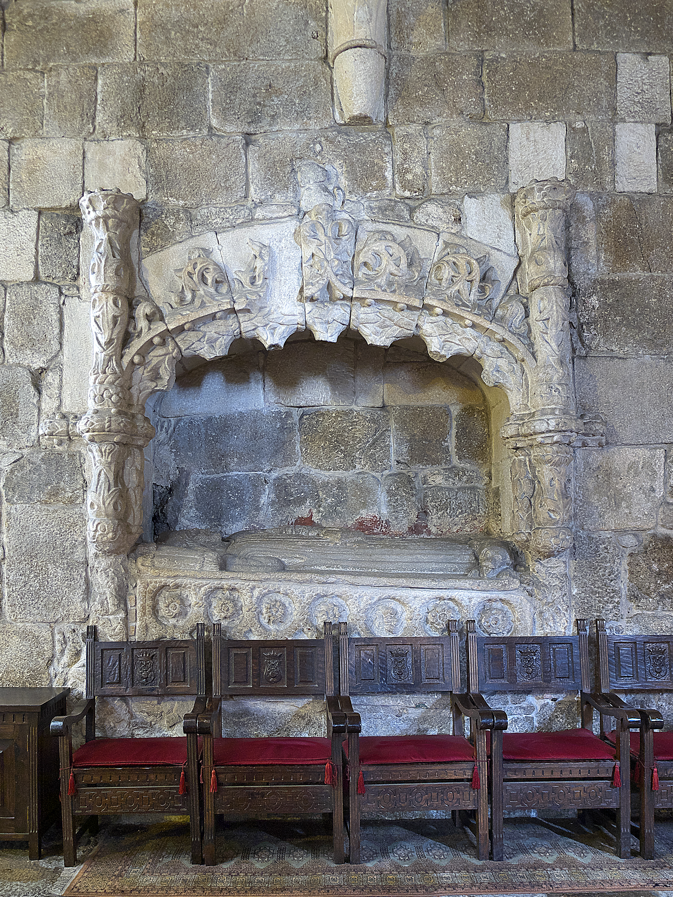 Colegiata de Santa María del Campo, La Coruña. Sepulcro de Fernando Bermúdez de Castro (†1515), primer abad de la colegiata.